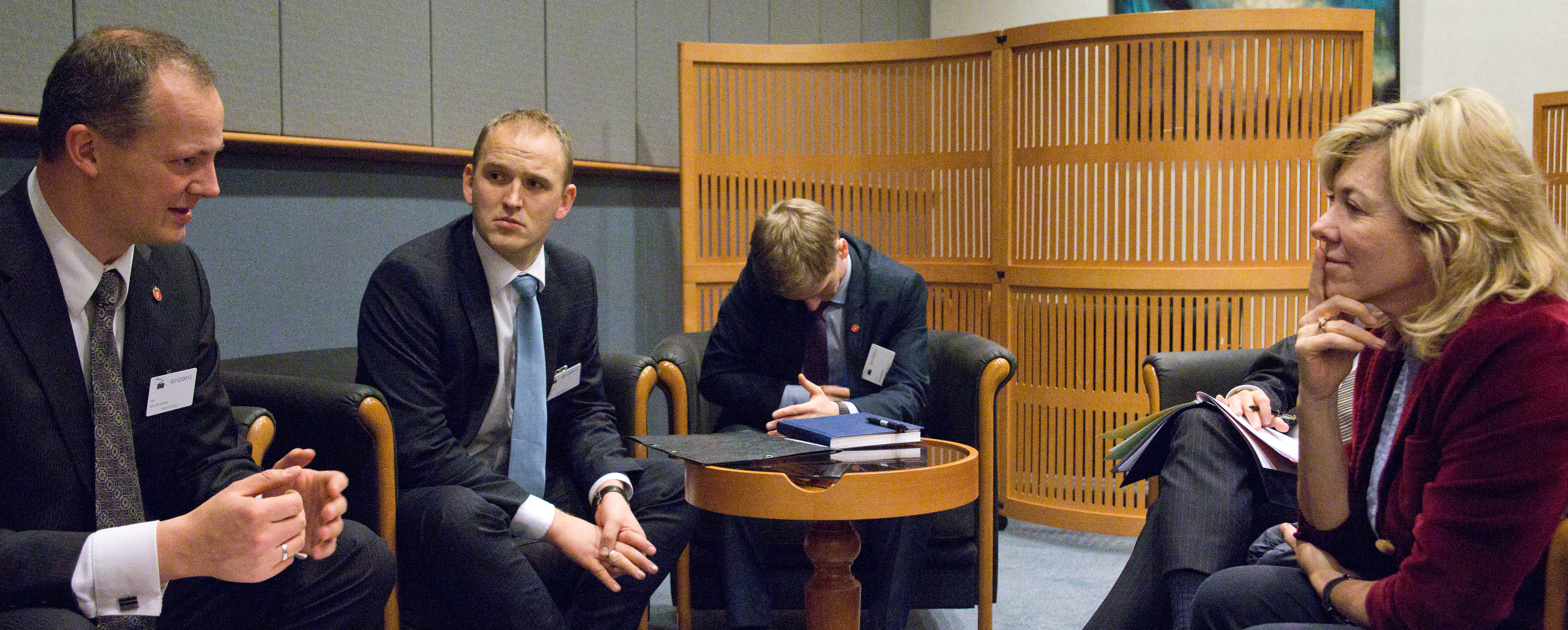 2. desember 2013 var samferdselsminister Ketil Solvik-Olsen (t.v.) i Brussel for å møte europaparlamentariker Pilar Del Castillo (t.h.), Europaparlamentets rapportør på ekompakken. Bak fra venstre: statssekretær Jon Georg Dale og politisk rådgiver Reynir Jóhannesson. Foto: Stian Mathisen, EU-delegasjonen